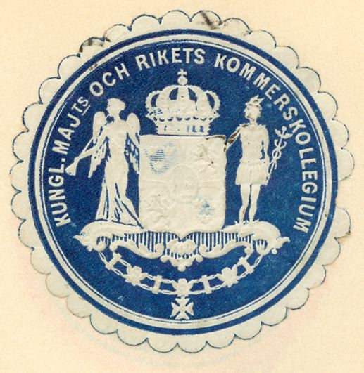 Sigill för Kommerskollegium inklistrat i album. Blått tryck på vitt papper. 1932.